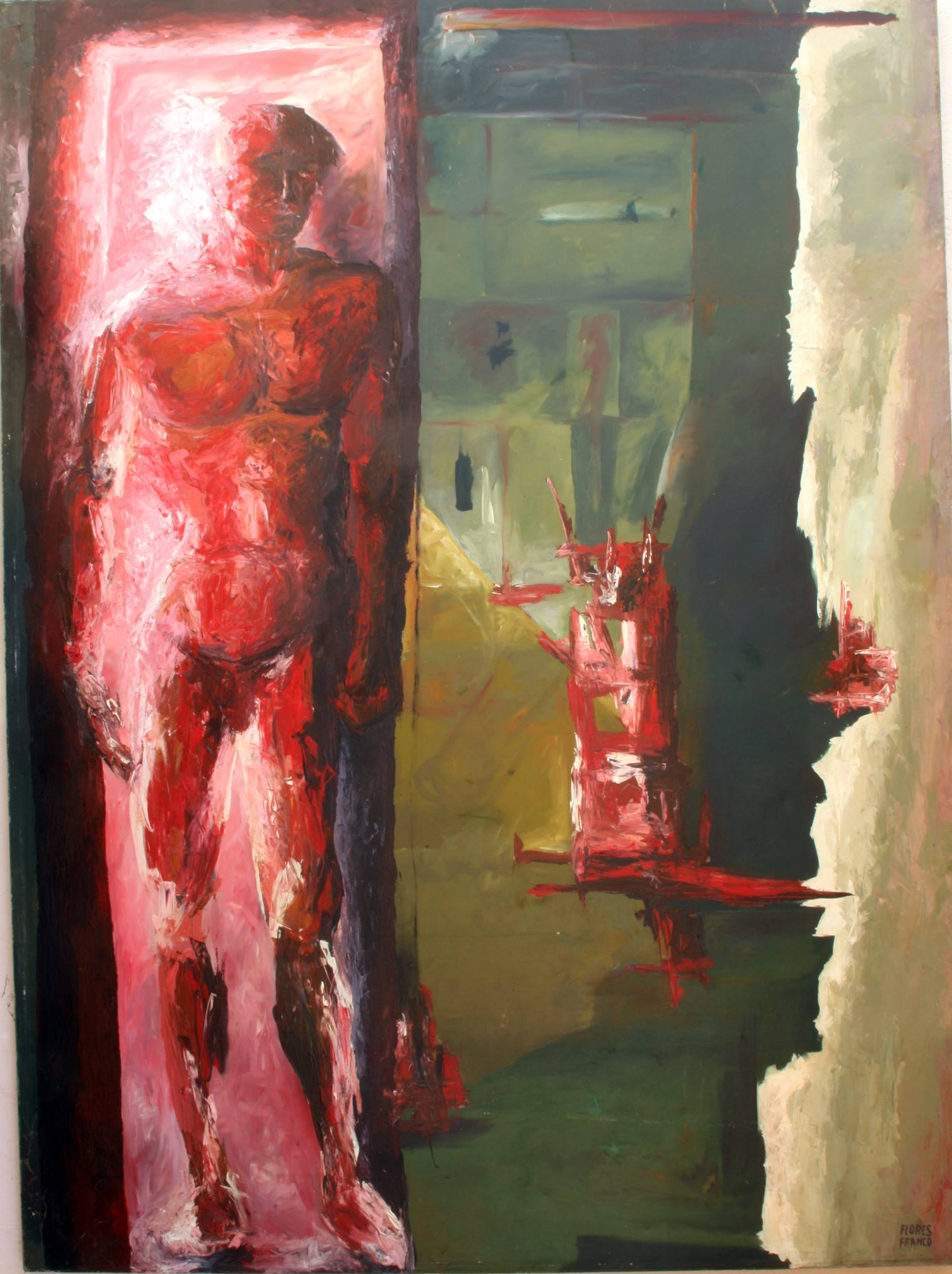 Cotidiana vida